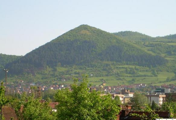 Vrch Visočica pri meste Visoko, pripomína pyramídu, čo dokazujú aj posledné archeologické výskumy.